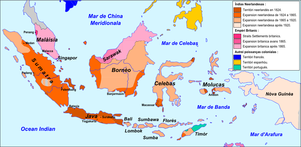 Expansion neerlandesa en Asia dau Sud-Èst a partir de 1824.